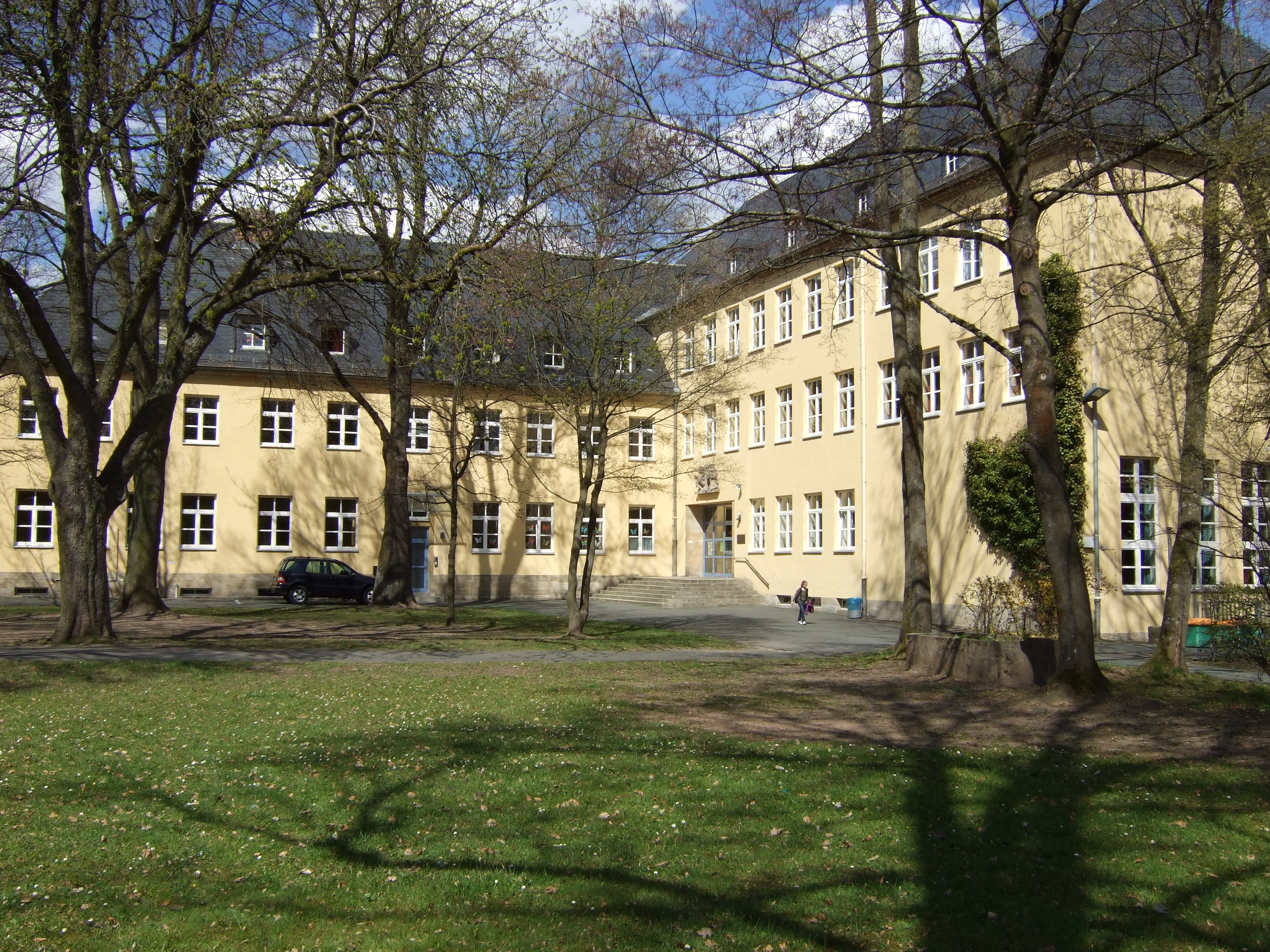 Jean-Paul-Schule Bayreuth, Königsallee 19